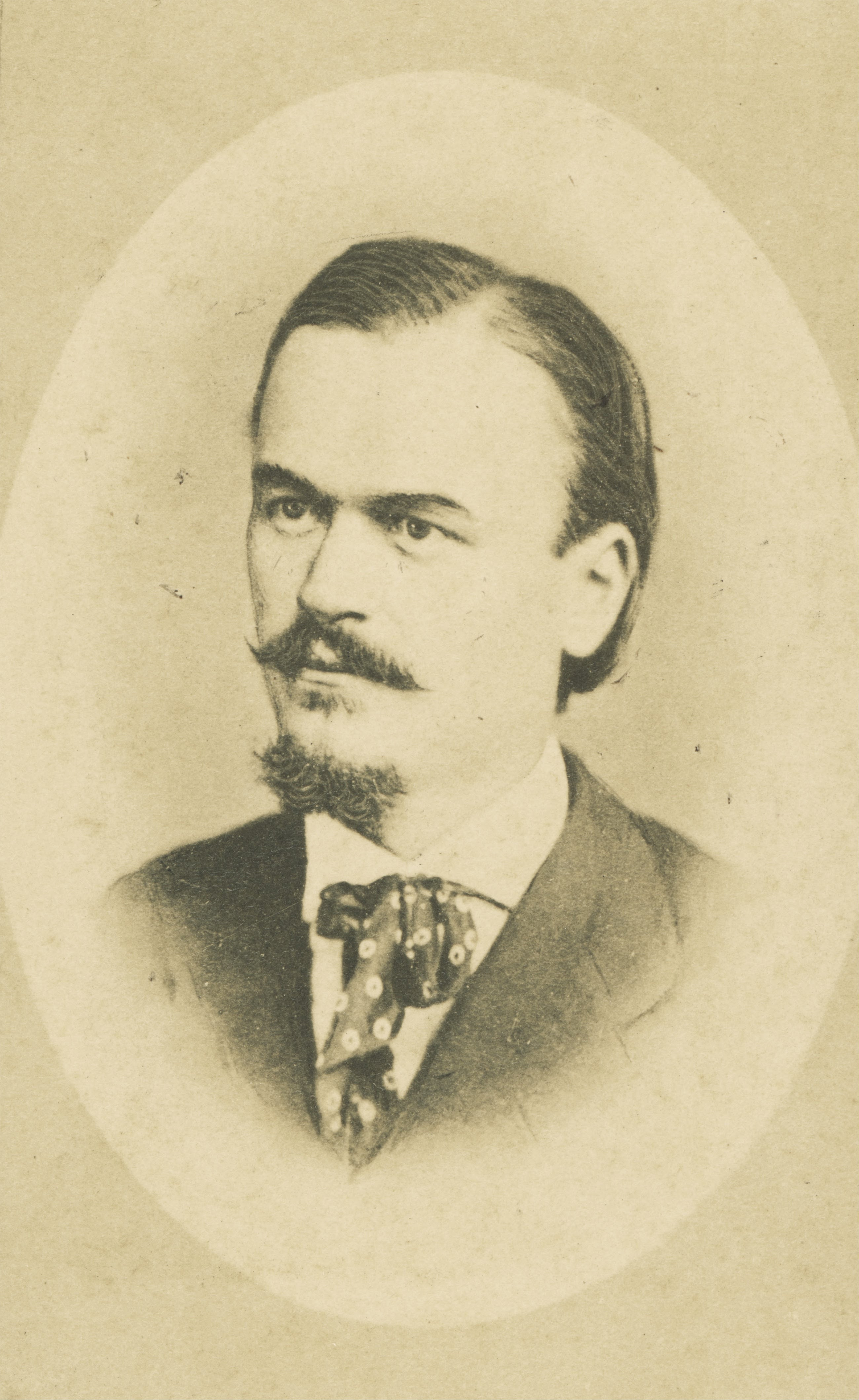 Josip Jurčič (1844-1881), Slovene writer and journalist.